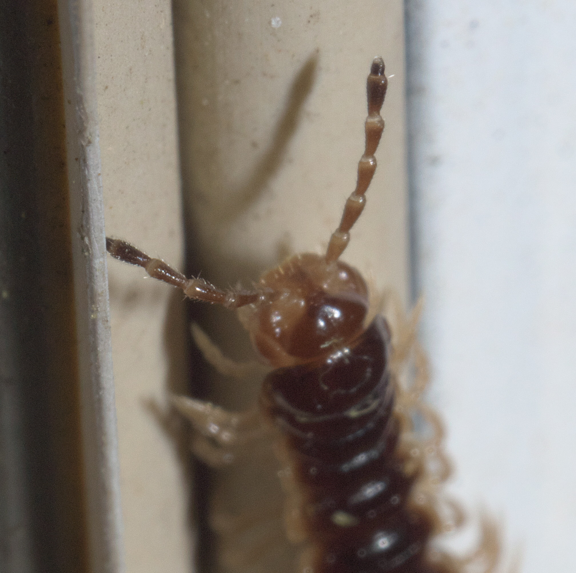 Oxidus gracilis, greenhouse millipede, ID Confidence: 84